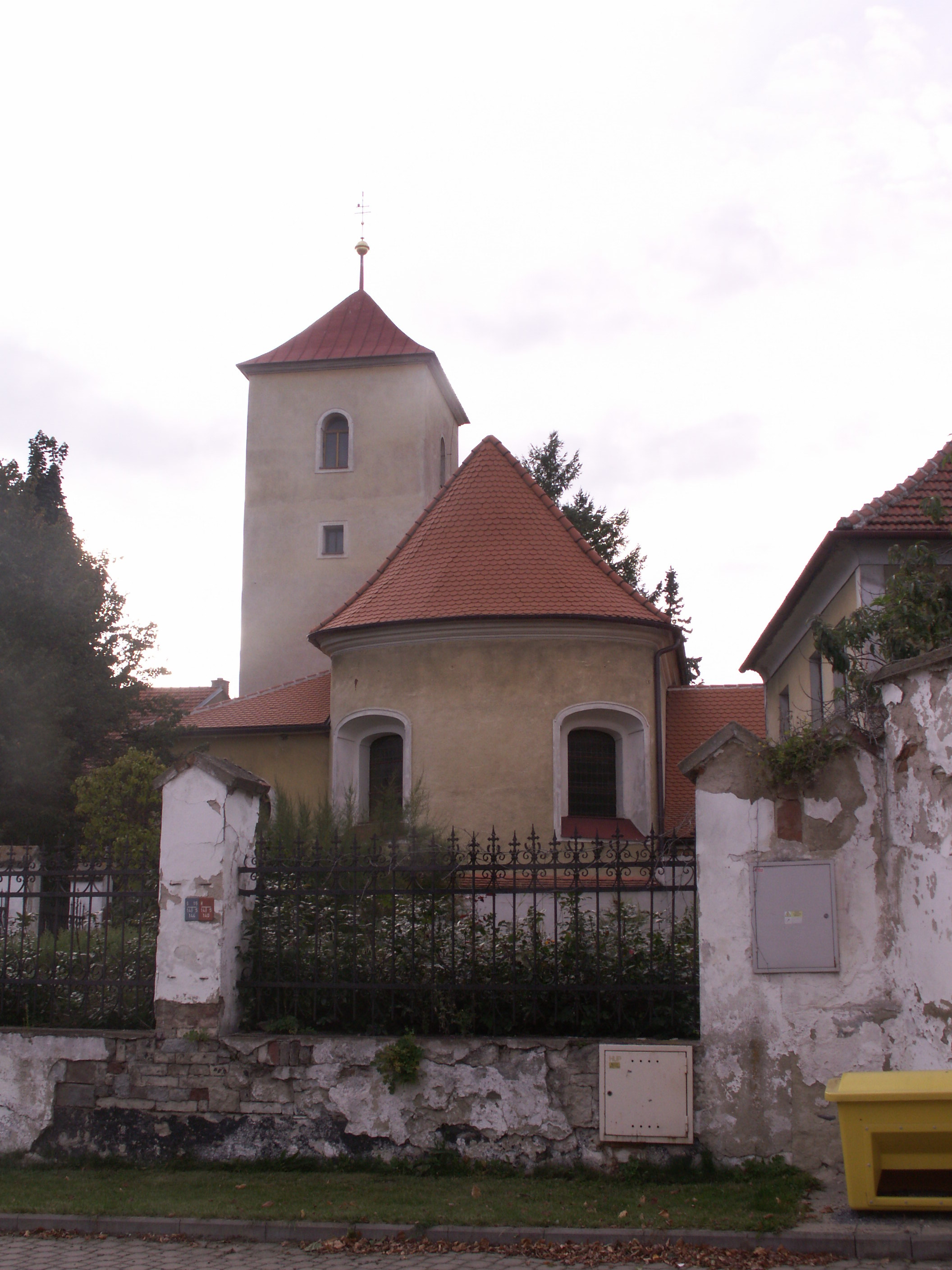 kostel Nejsvětější Trojice, Lažánky, okres Brno-venkov